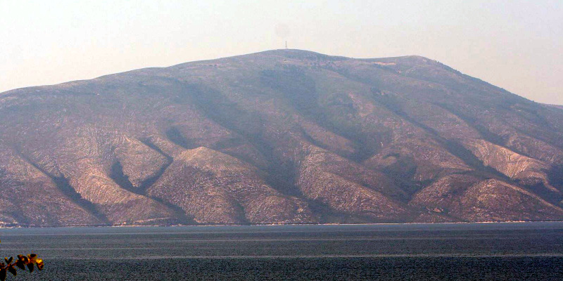 The Karaburun peninsula in Vlora, Albania